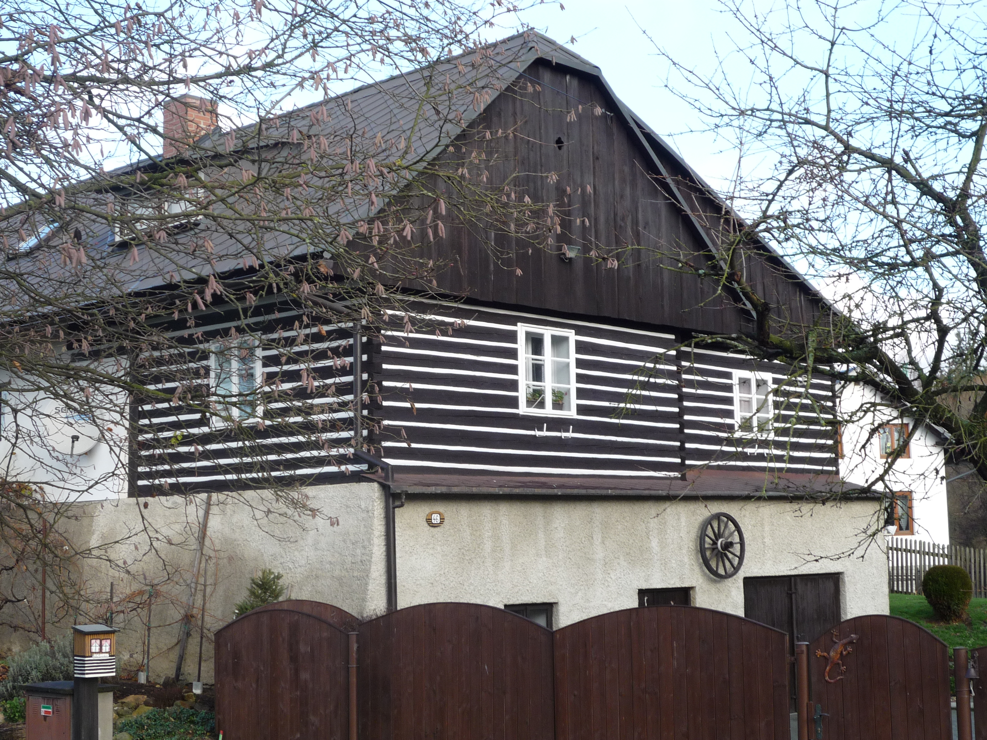 Autor fotografie Jiří Zelenka. Toulky Vysočinou. Pohled okr. Havlíčkův Brod